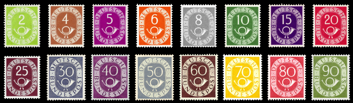 Stamp description / Briefmarkenbeschreibung Posthorn-Serie Ausgabepreis: 16 Werte von 4 bis 90 Pfennig First Day of Issue / Erstausgabetag zwischen: 20. Juni 1951 und 16. April 1952 Michel-Katalog-Nr: 123 bis 138